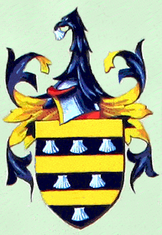 Wappen der Barone de Vichery 1817